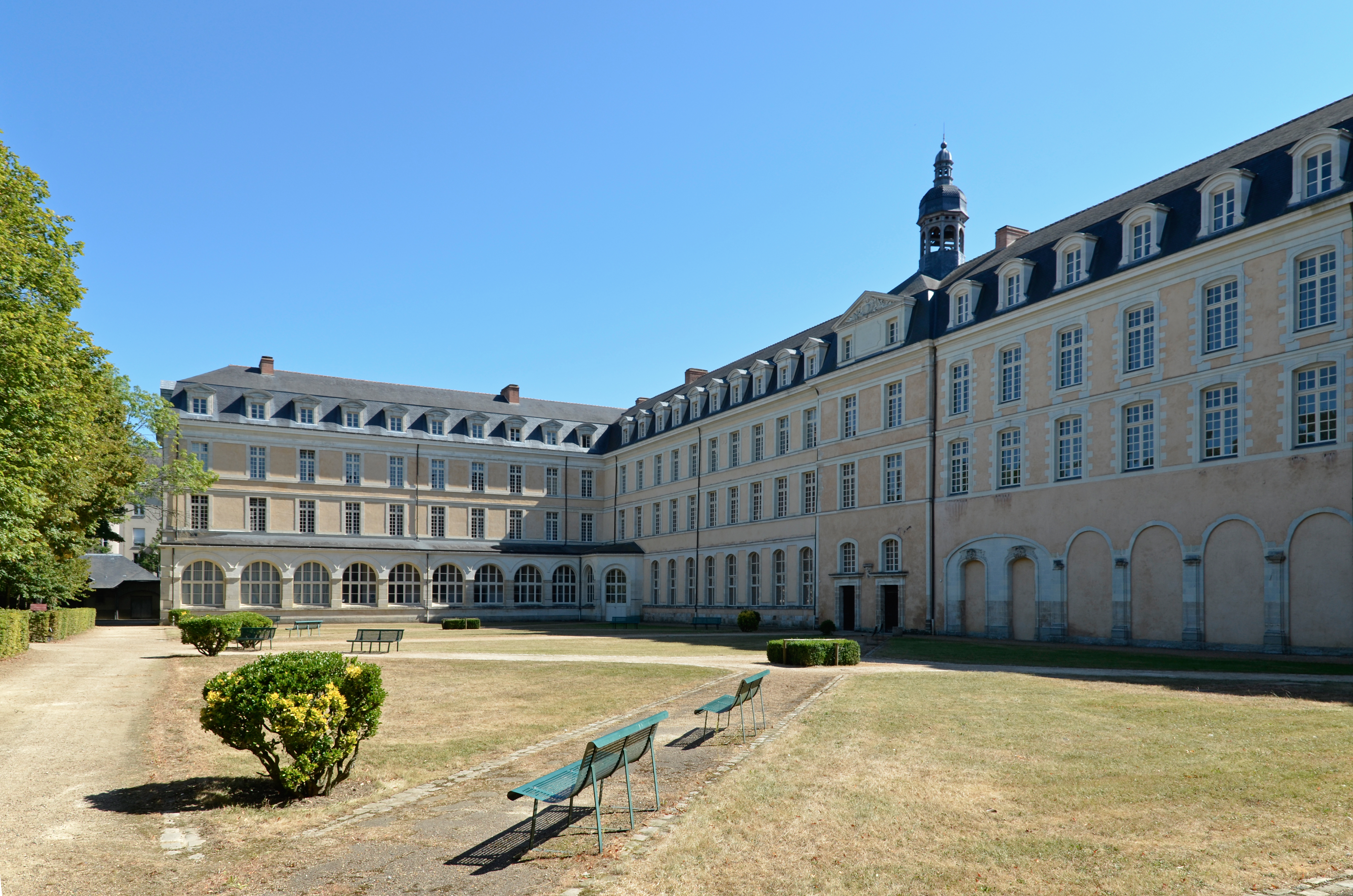 Abbaye Saint-Vincent, actuel lycée Bellevue - Le Mans, Sarthe .